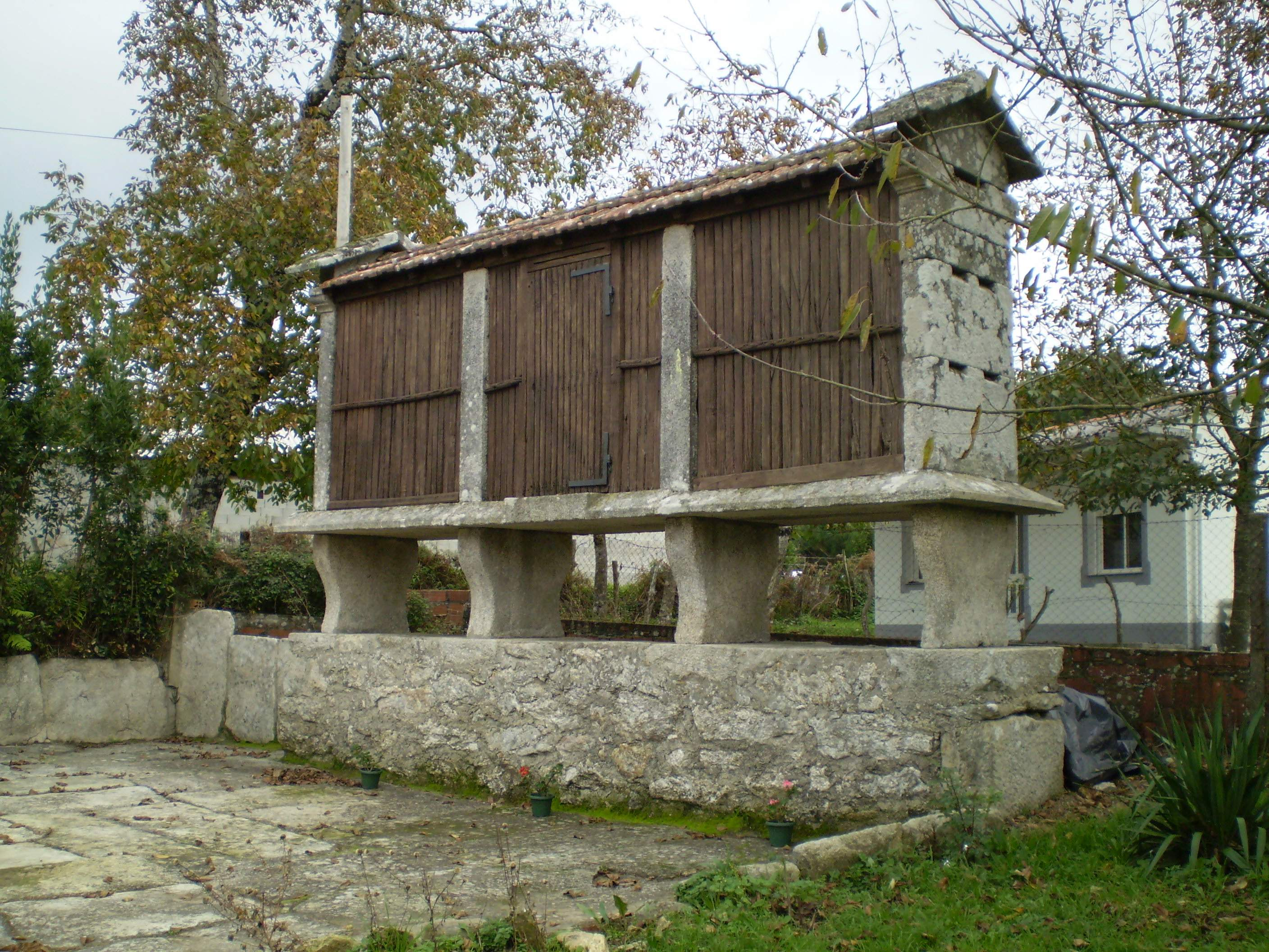 Hórreo en Vilasión (Antas de Ulla)